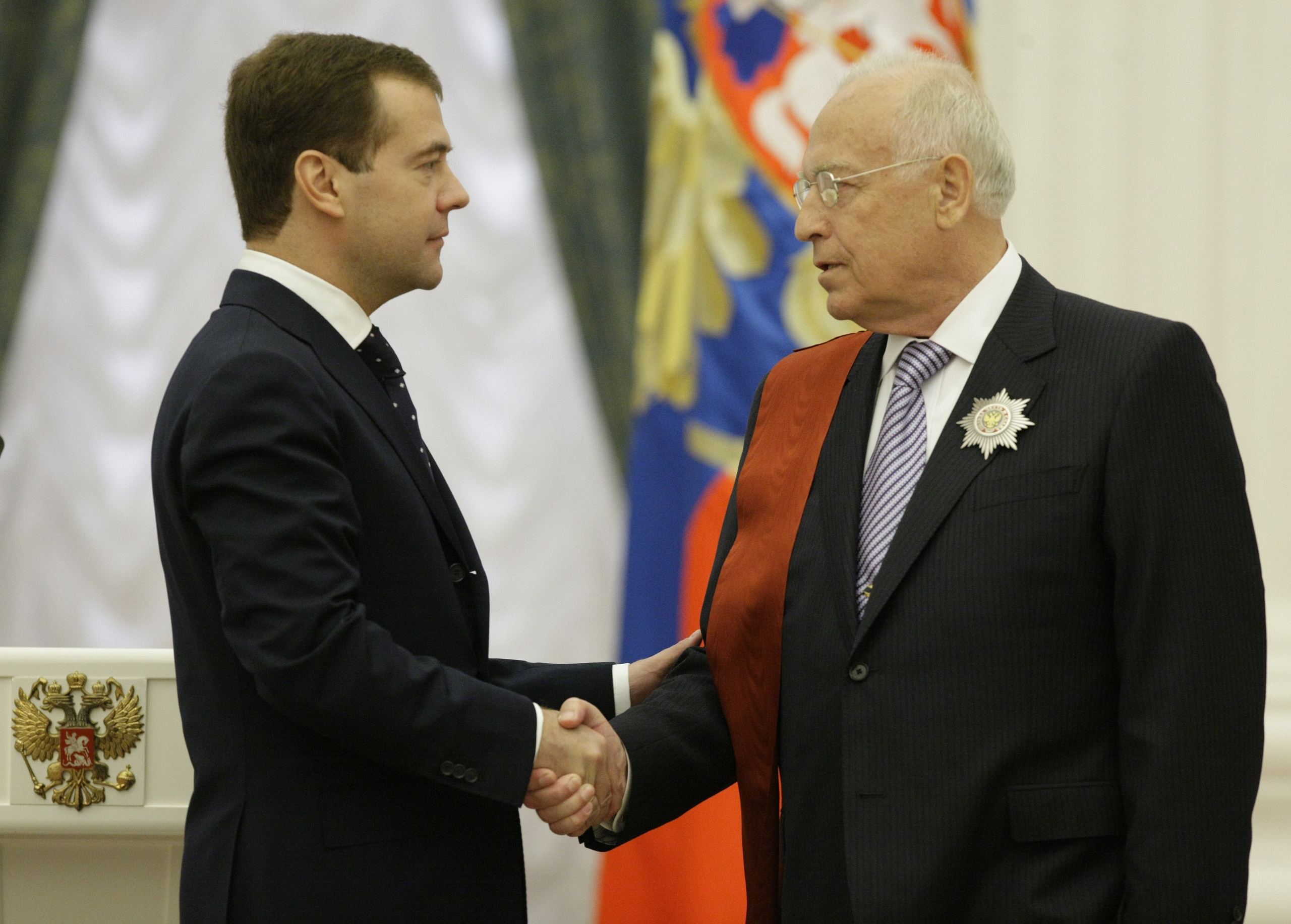 МОСКВА, КРЕМЛЬ. Церемония вручения государственных наград. Чрезвычайный и Полномочный Посол Российской Федерации в Украине Виктор Черномырдин награждён орденом «За заслуги перед Отечеством» I степени.